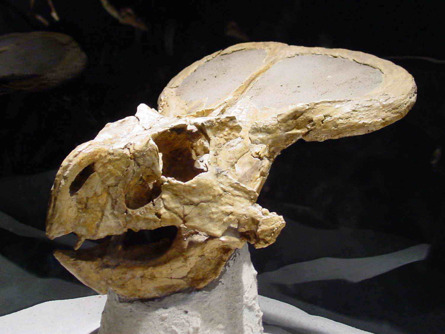 Foto tirada cunha Nikon E8800